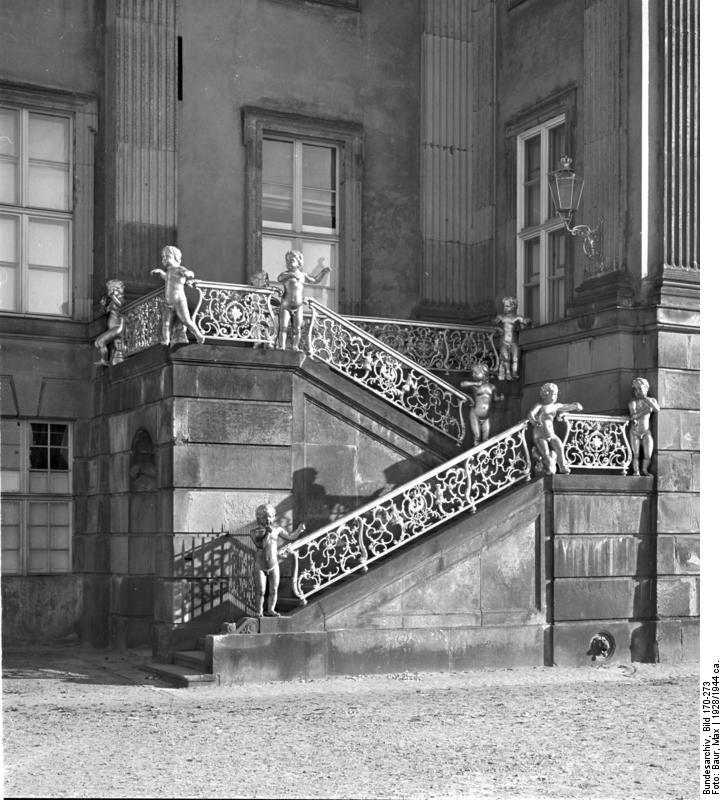 Potsdam.- Fahnentreppe am Stadtschloß